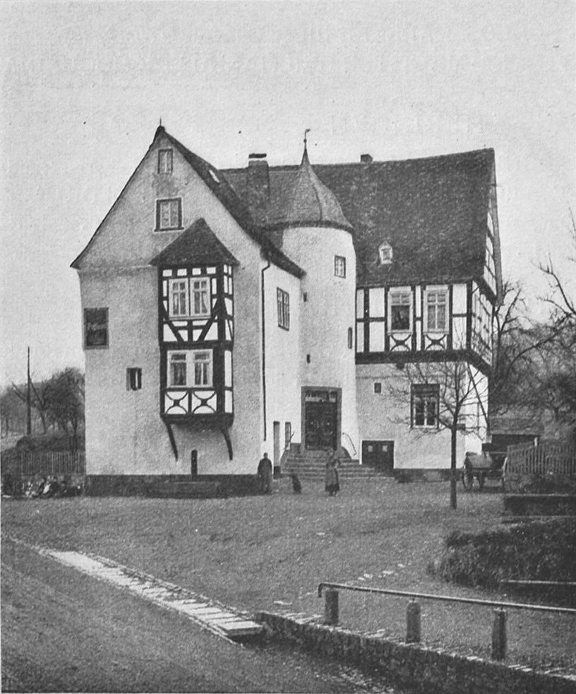 Hofhaus Langendernbach ca. 1921. Fotografie von Ferdinand Luthmer.